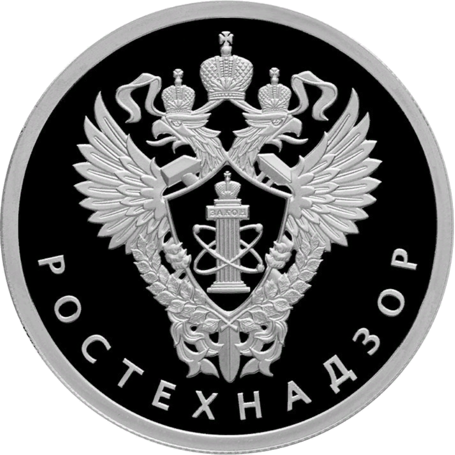 Монета Банка России — Ростехнадзор. 1 рубль, серебро, реверс, пруф. Рельефное изображение геральдического знака — эмблемы Федеральной службы по экологическому, технологическому и атомному надзору (Ростехнадзора); внизу вдоль канта — надпись «РОСТЕХНАДЗОР». Чеканка: Санкт-Петербургский монетный двор. Художник: А.Д. Щаблыкин. Скульптор: компьютерное моделирование.